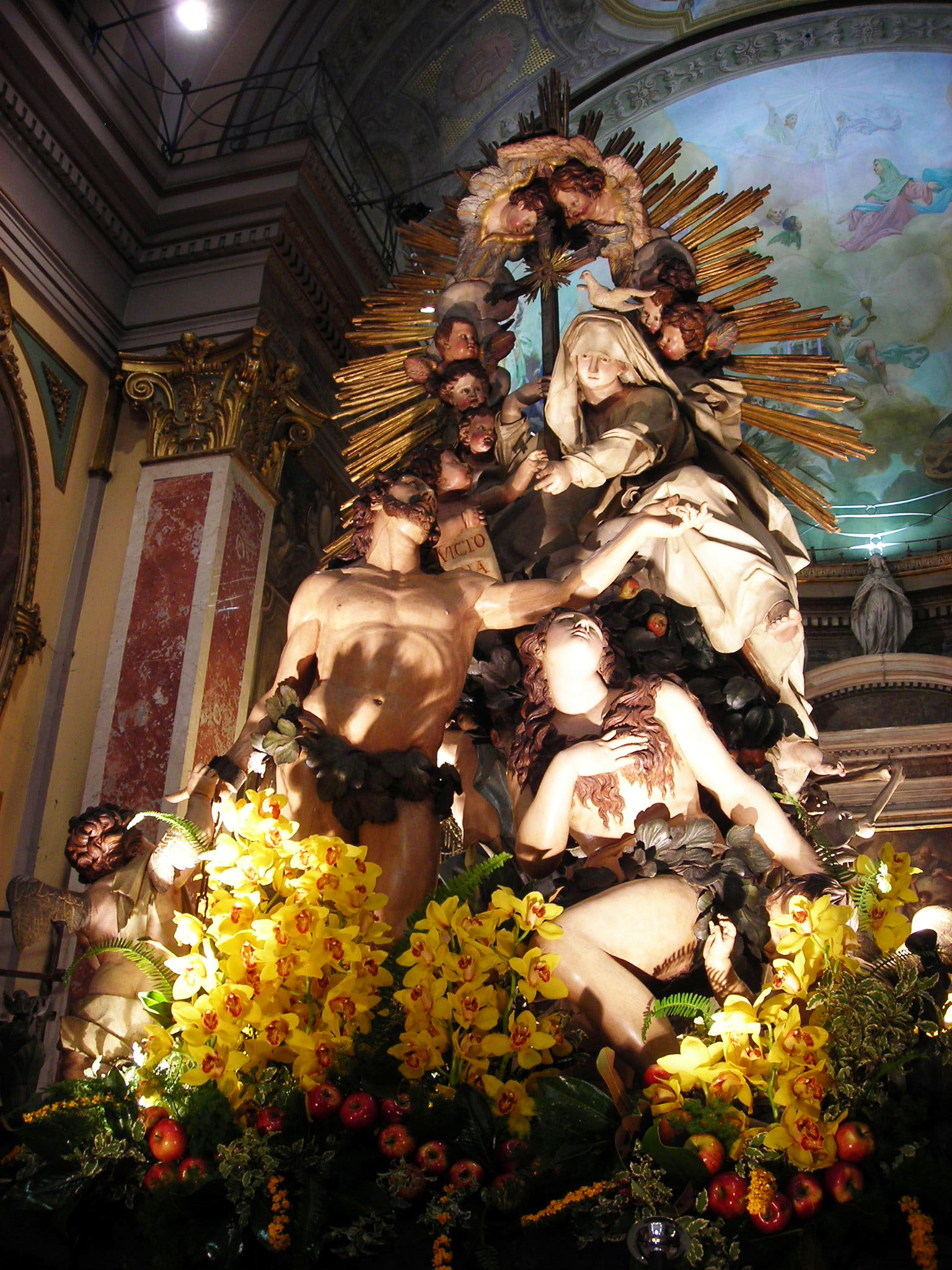 La Promessa del Redentore, Filippo Martinengo 1777